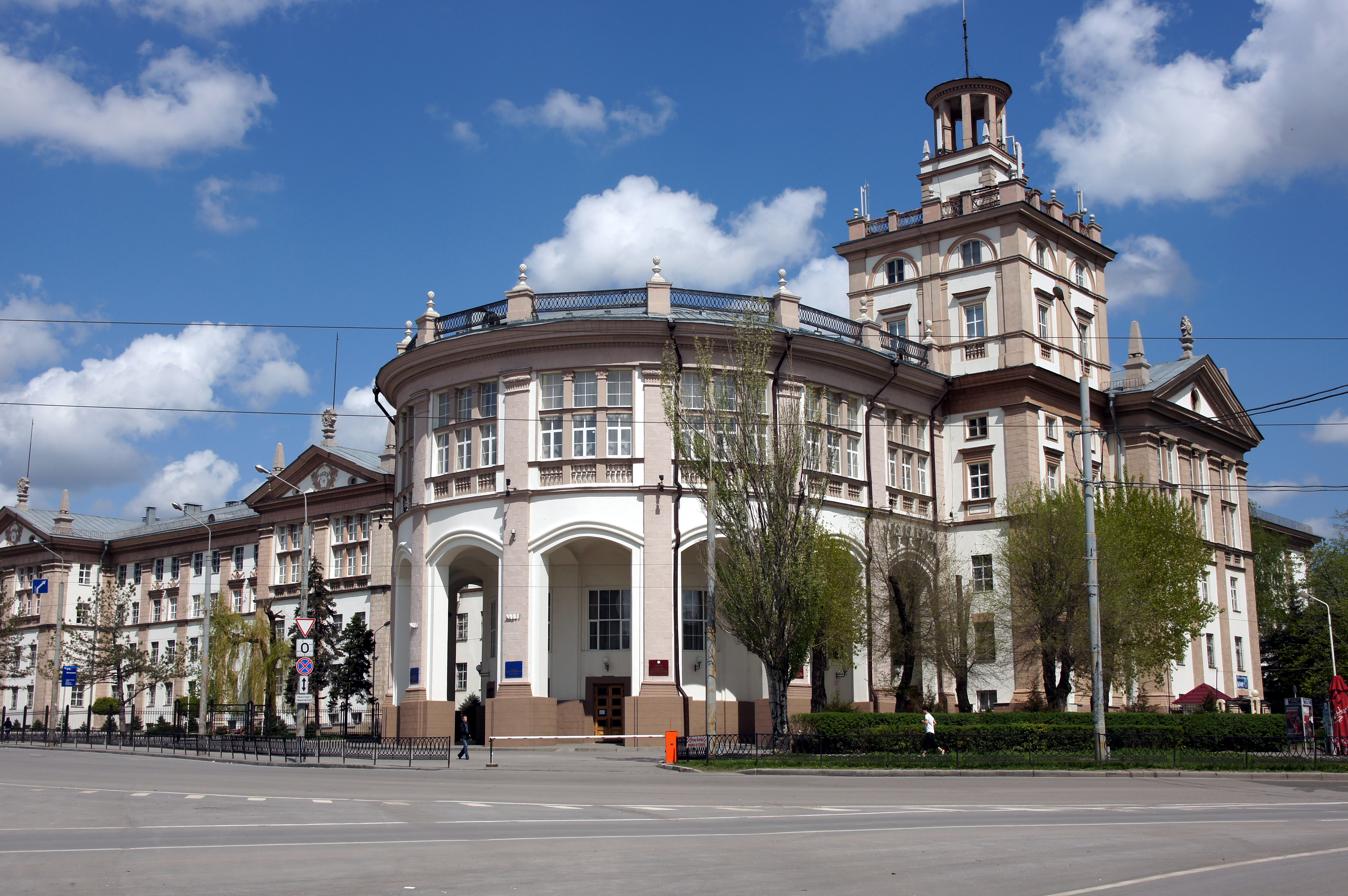 РГУПС